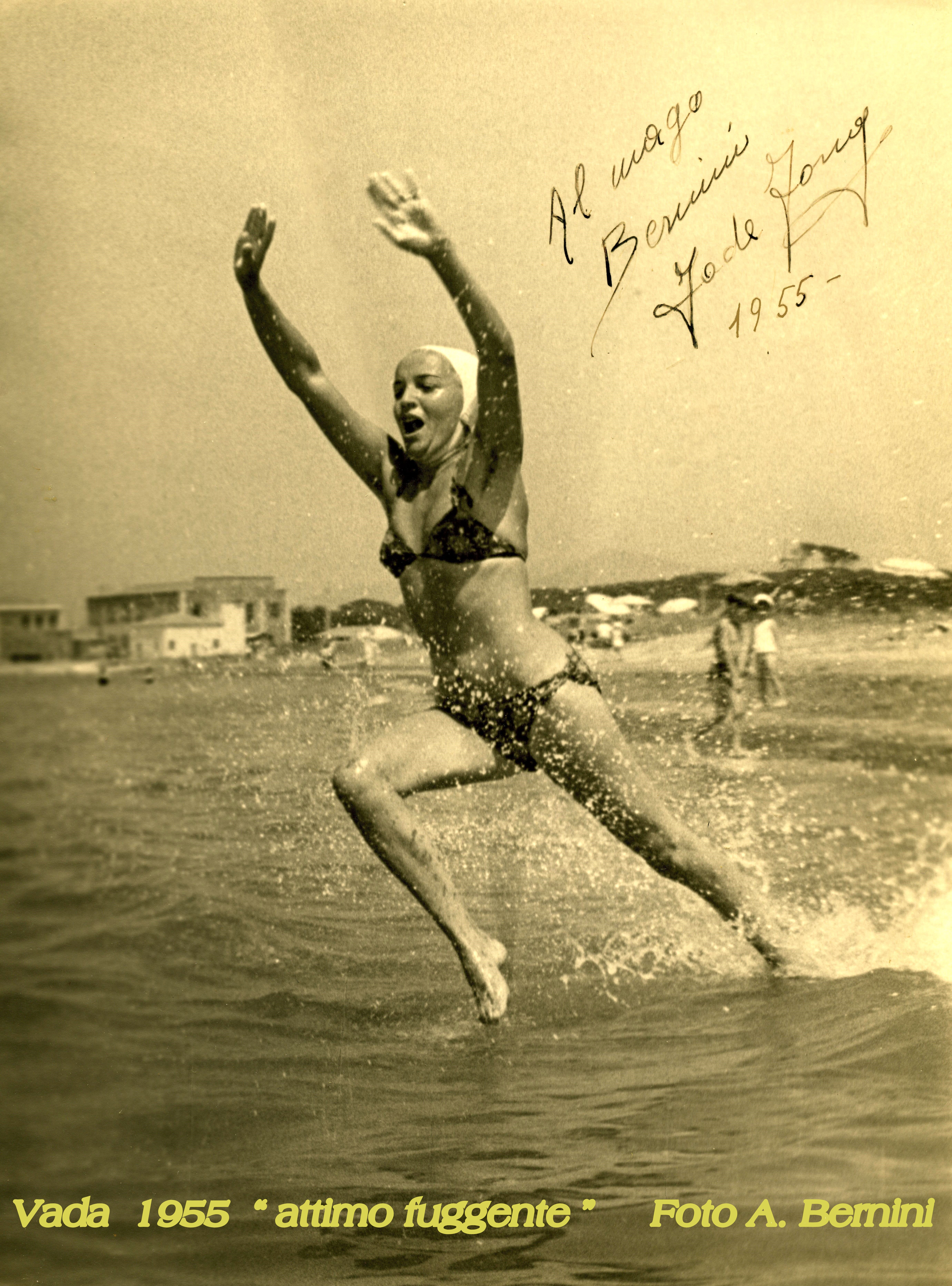 Vada: foto con dedica (soggetto non identificato)